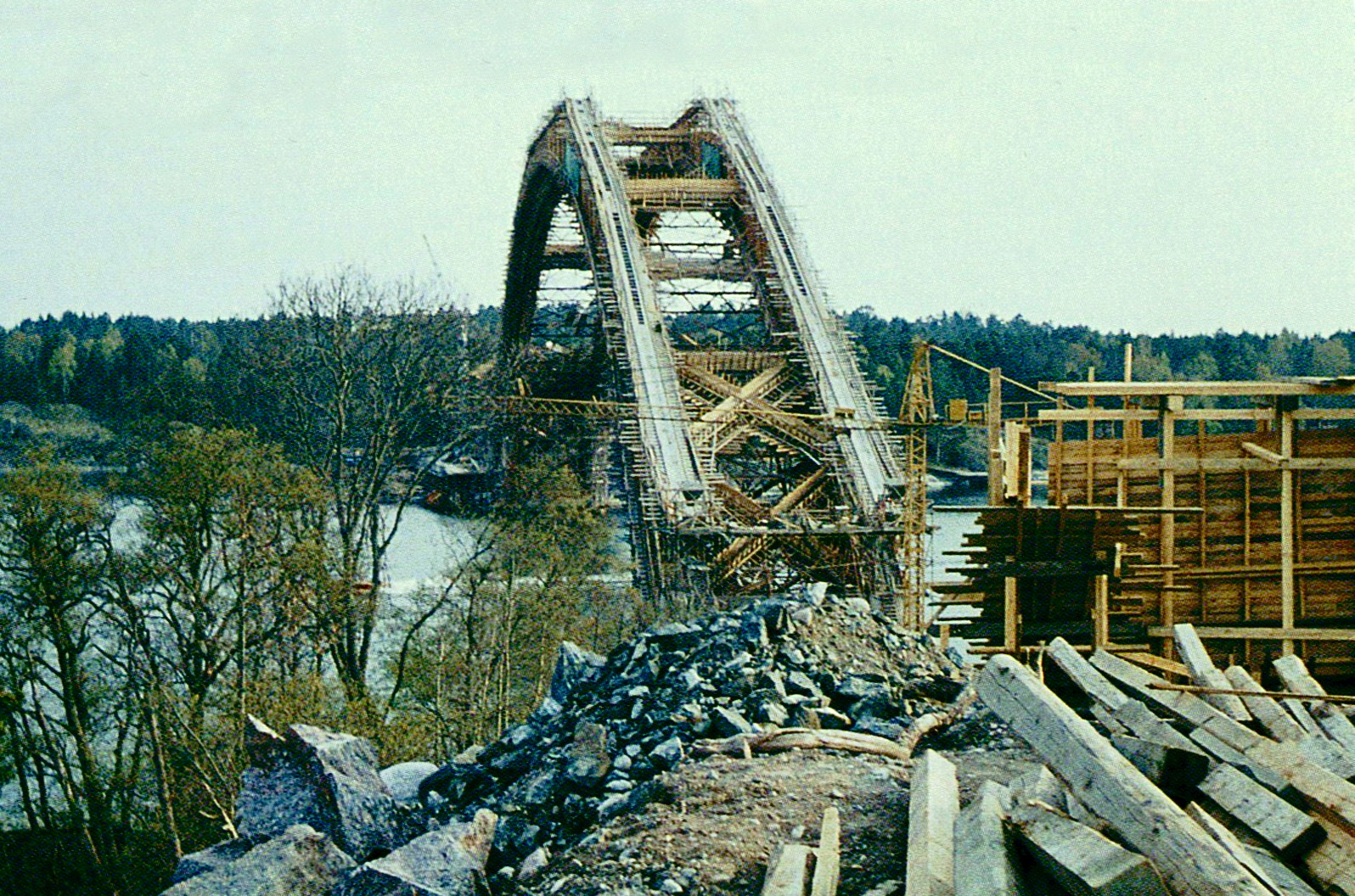 Djuröbron under uppförande på vintern 1961